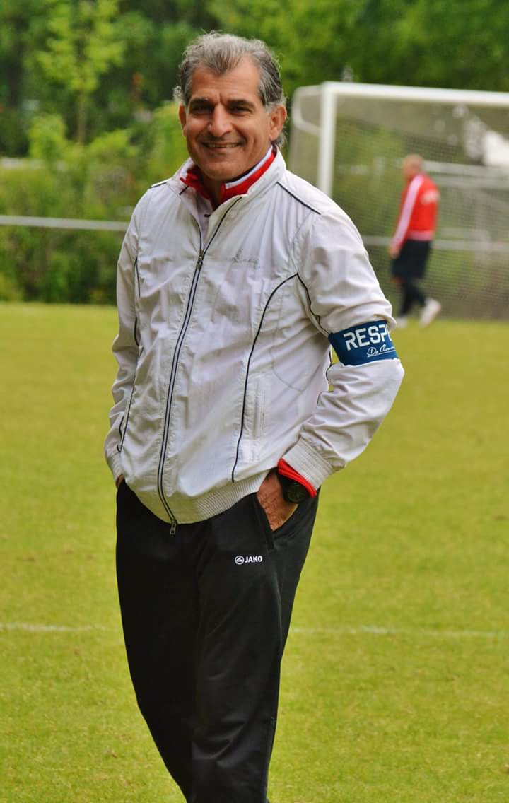 Amir Hashemi Moghaddam